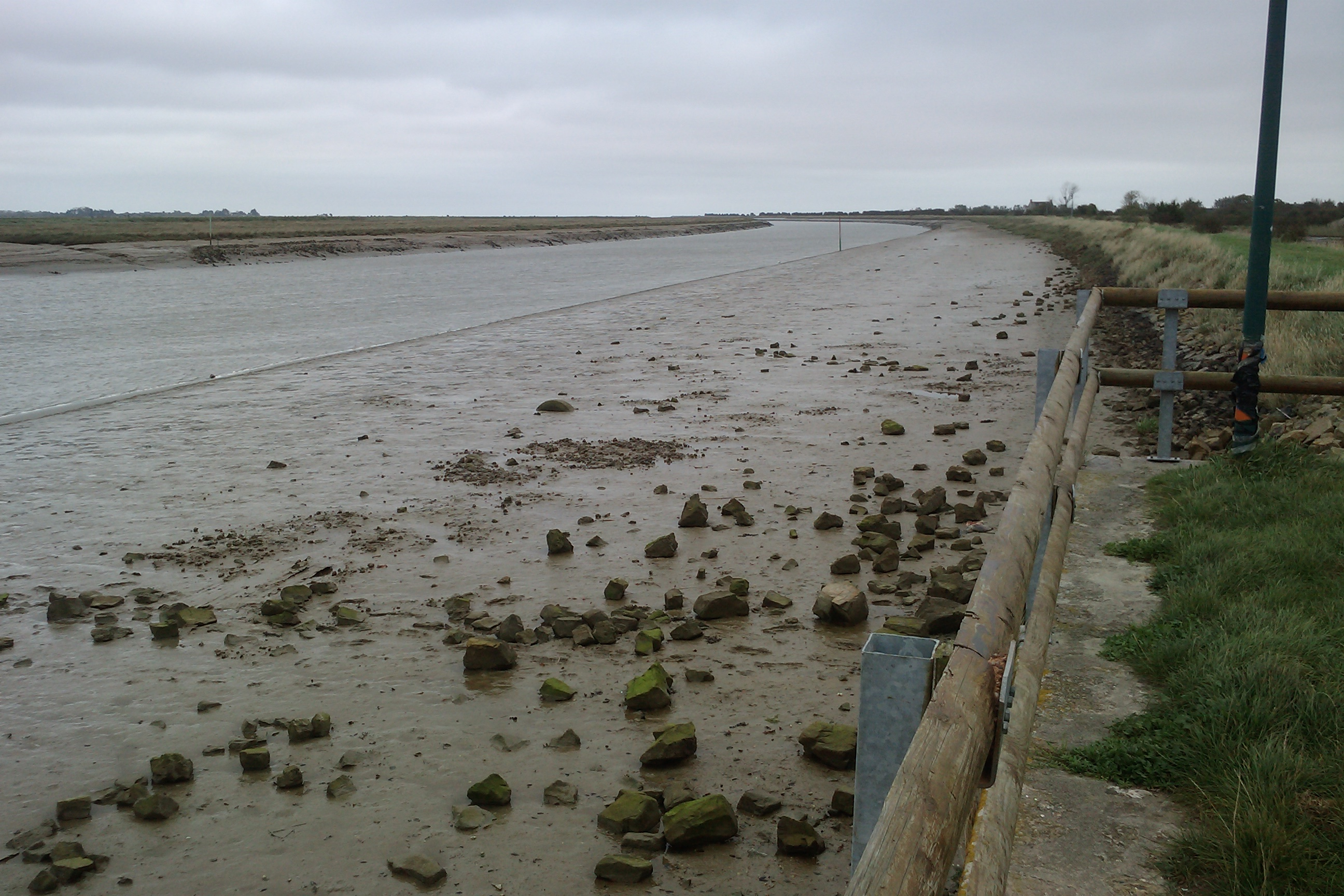 le port de Brévands